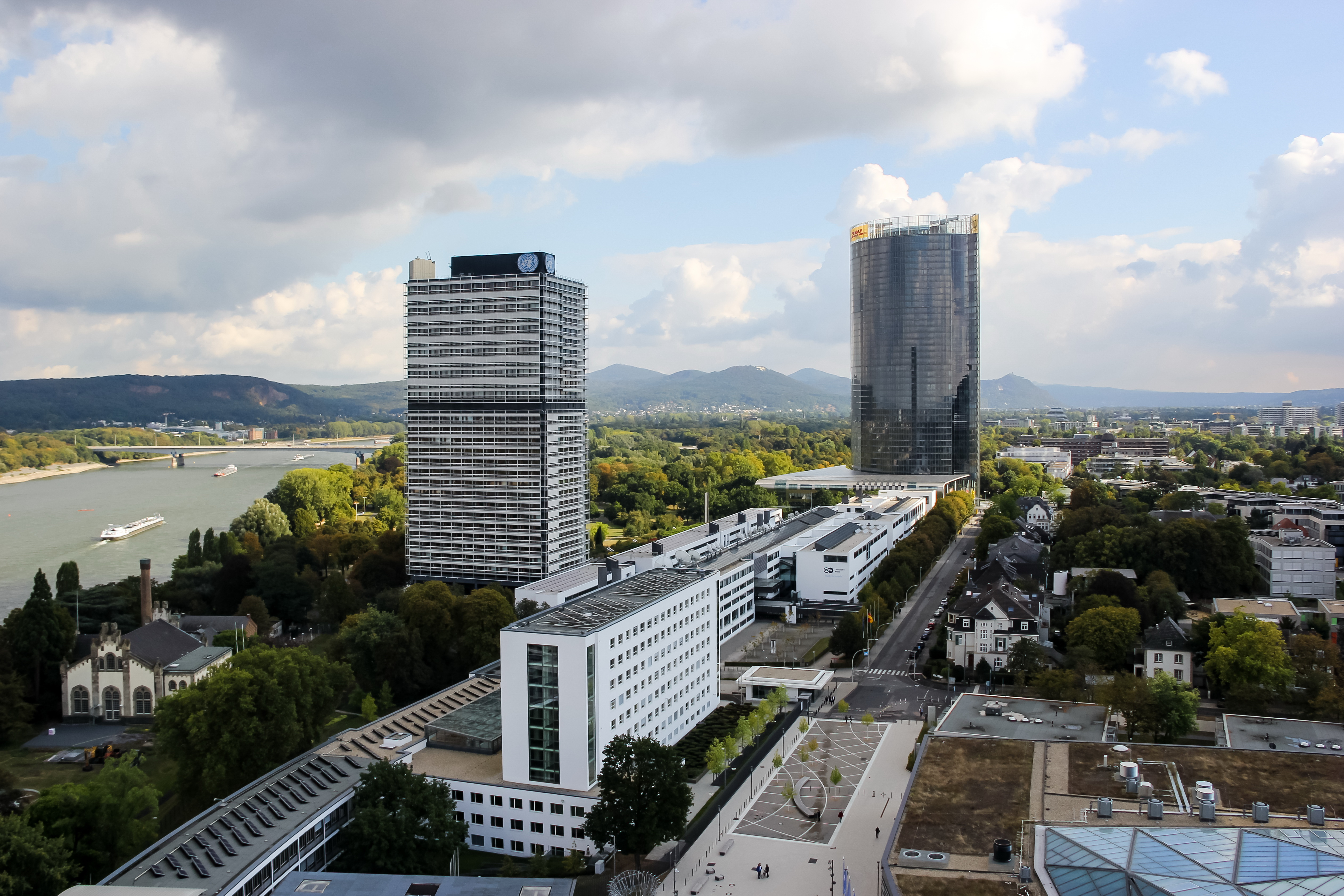 Bonn Marriott World Conference Hotel; Blick von der Terrasse des Sky Restaurants auf den Langen Eugen und den Post Tower.